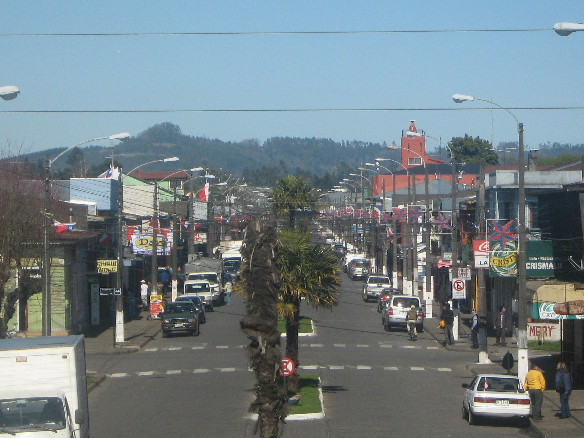 Calle Francisco Bilbao, arteria principal y comercial de Pitrufquén